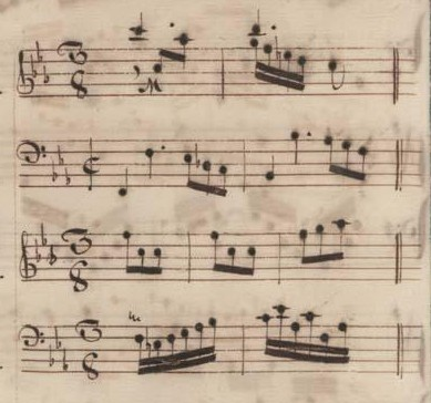 Table du volume II des manuscrits de Venise (incipit des sonates 8 à 11, K. 184 à 187). NB : Les sonates 12 à 16 sont des copies de K. 49, 149, 99, 98 et 140 respectivement.